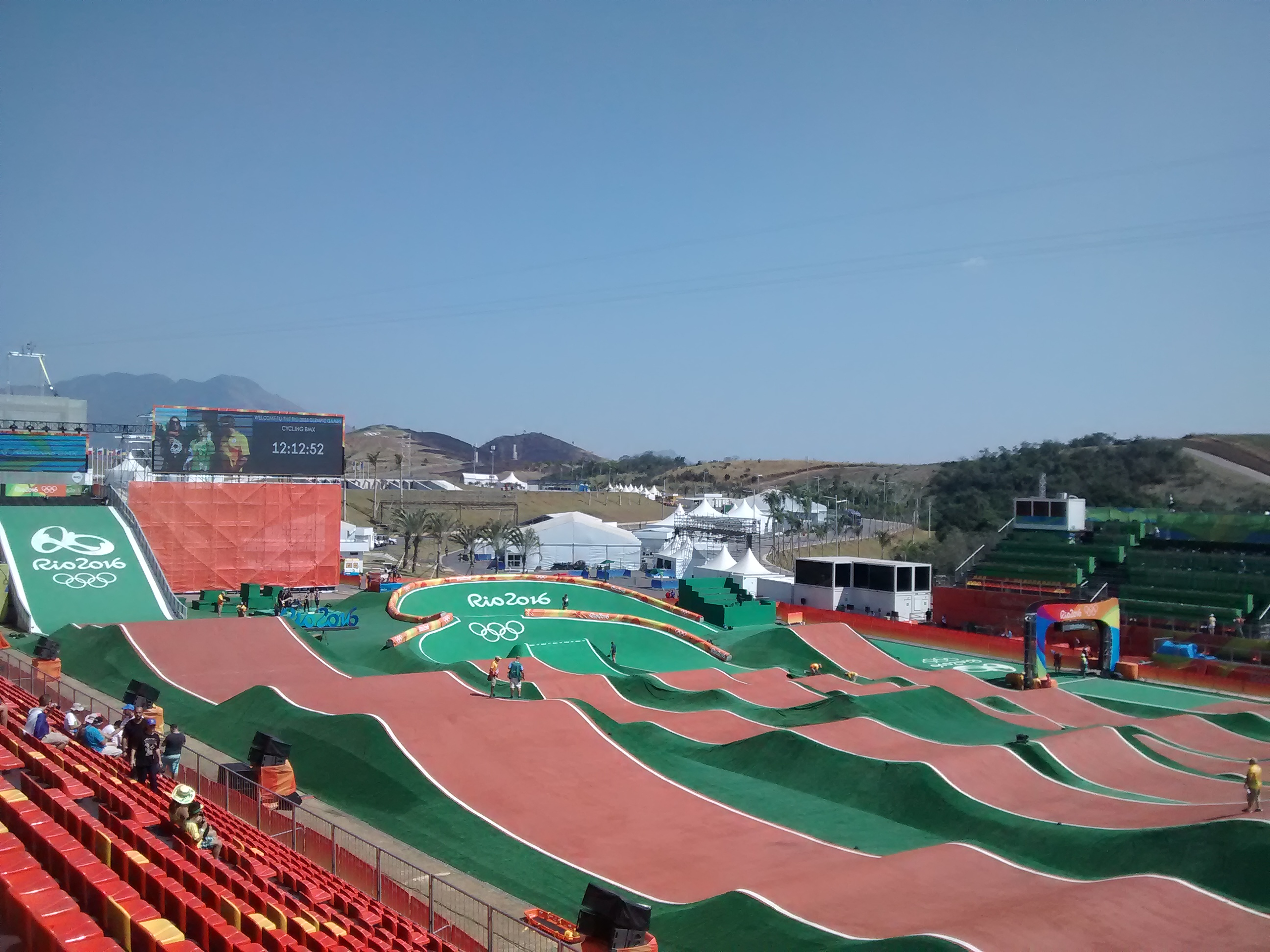 A pista de ciclismo BMX nessa foto é vista da arquibancada podendo abranger a visão da maior parte do circuito.